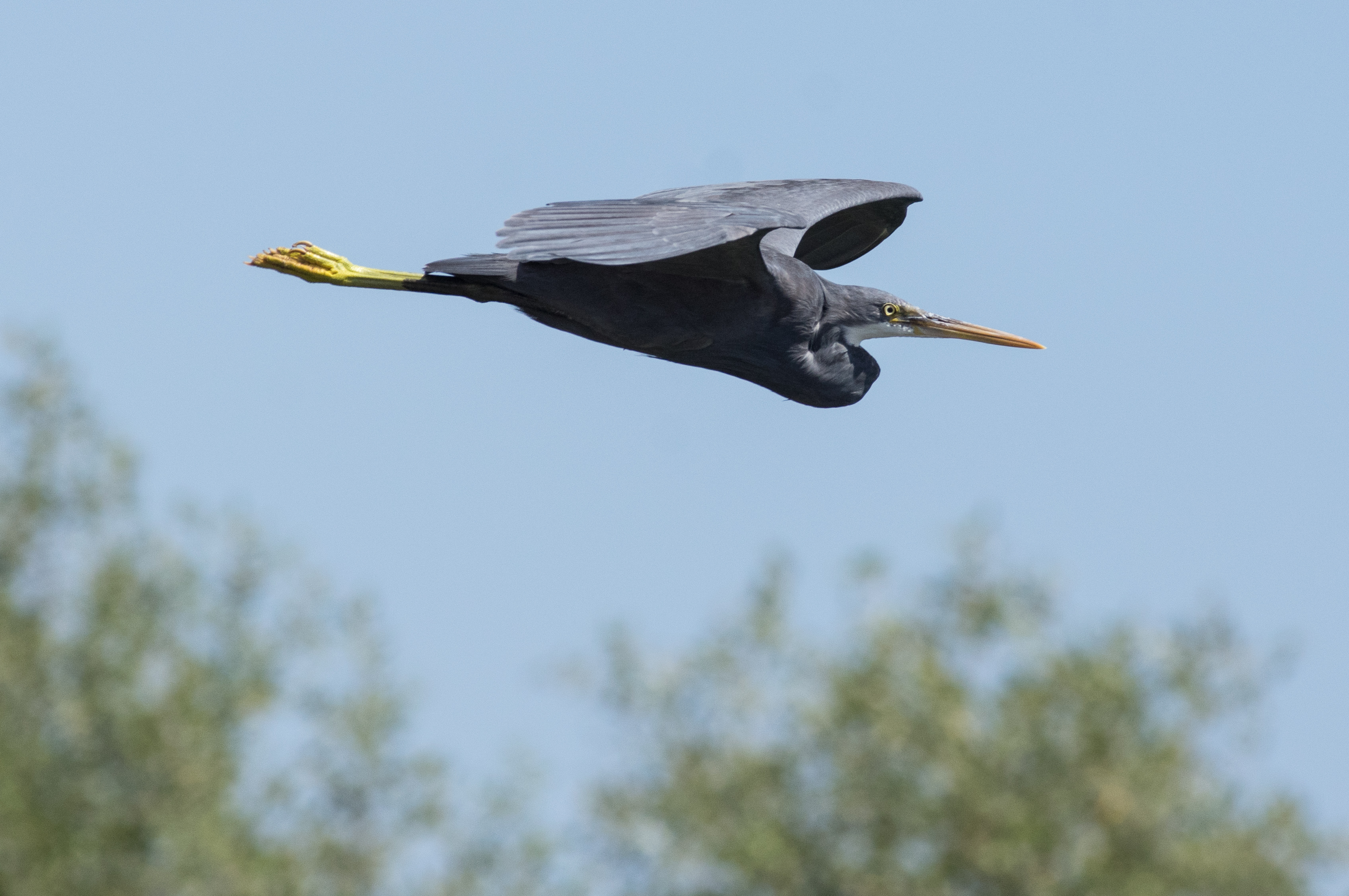 Küstenreiher, dunkle Morphe der Unterart E. g. schistacea' im Flug